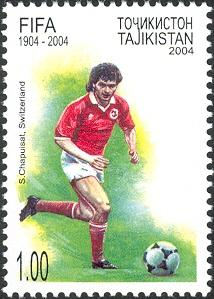 Stéphane Chapuisat on a Tajikistani stamp